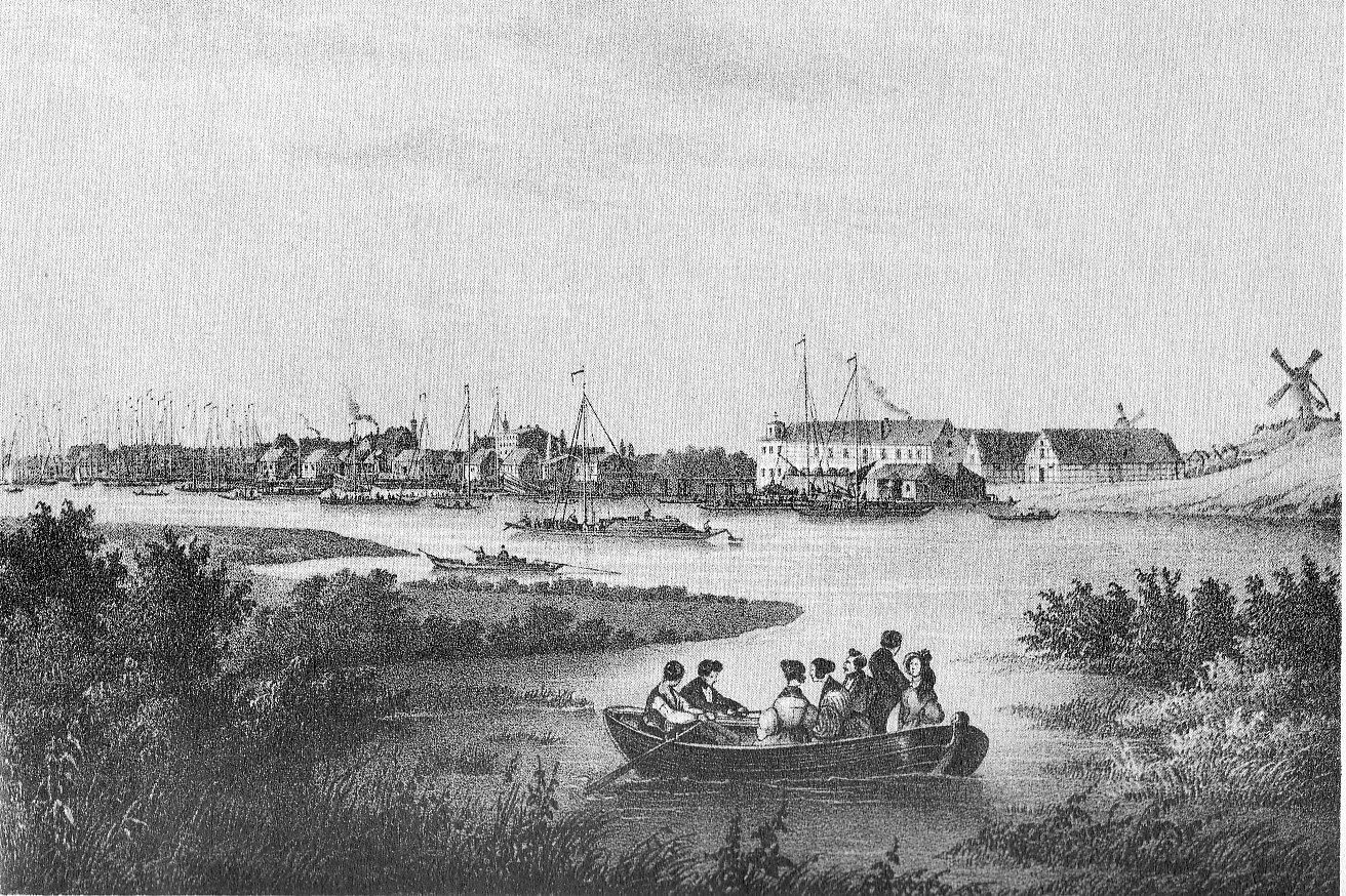 Historische Ansicht von Wittenberge in Brandenburg. Stahlstich.